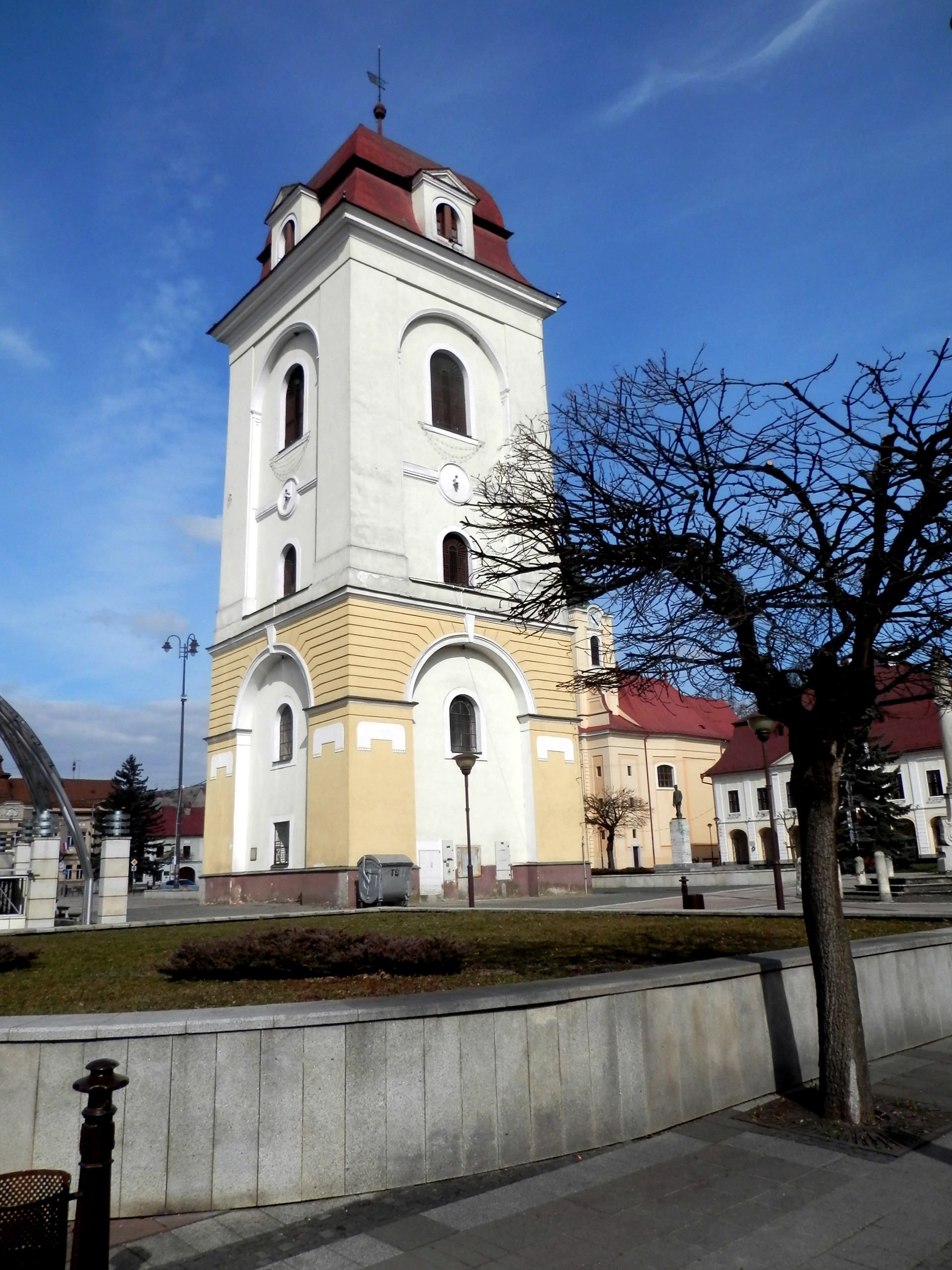 Štefánikovo námestie, mesto Brezno.